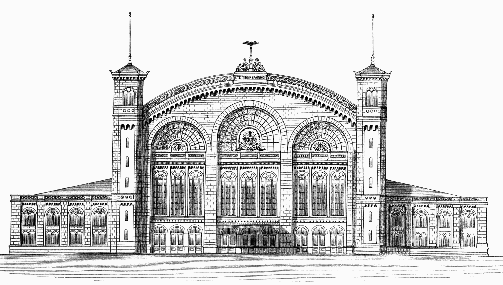 Berlin, Stettiner Bahnhof